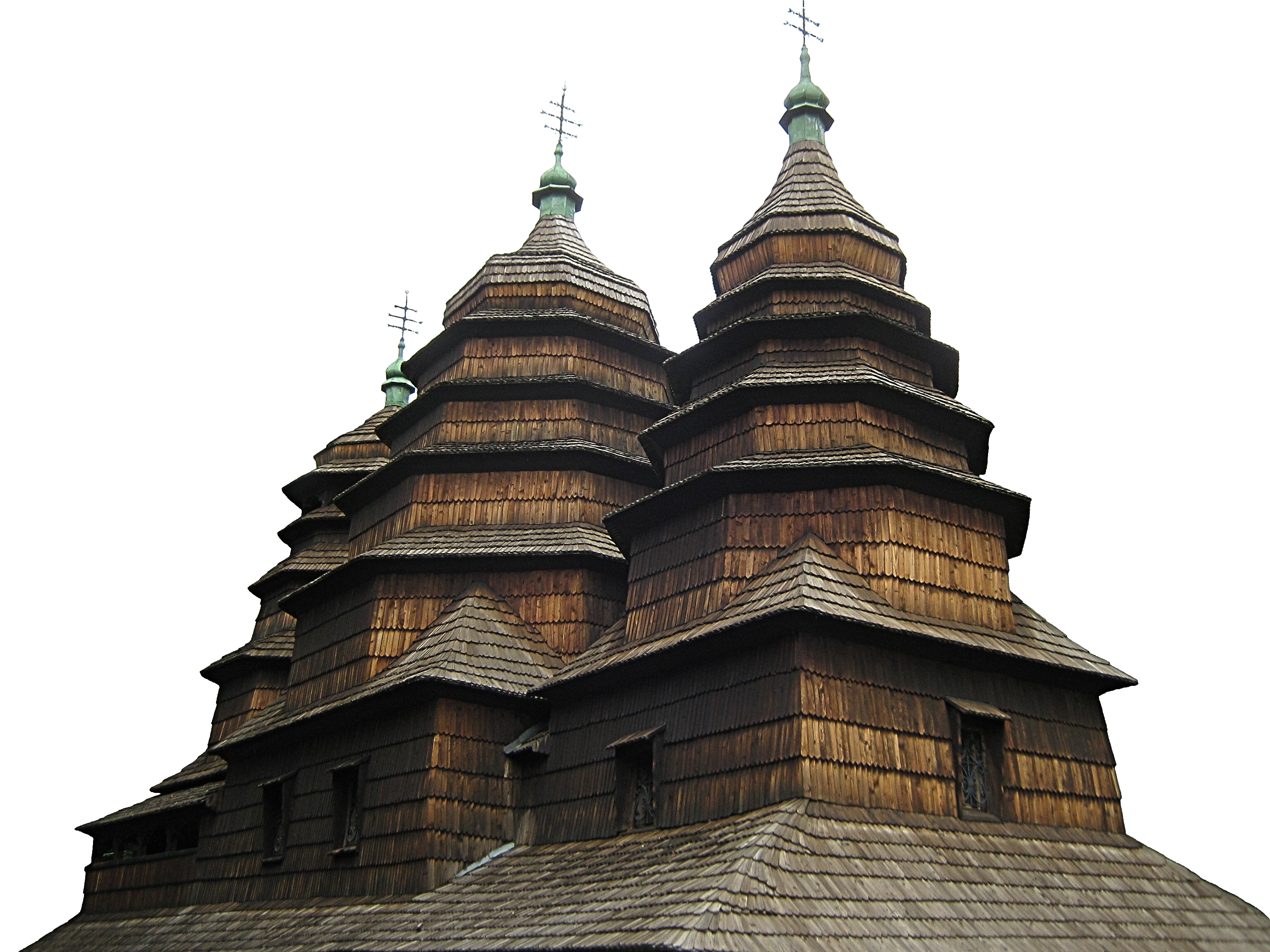 Церква з с.Кривка Туркiвського р-ну